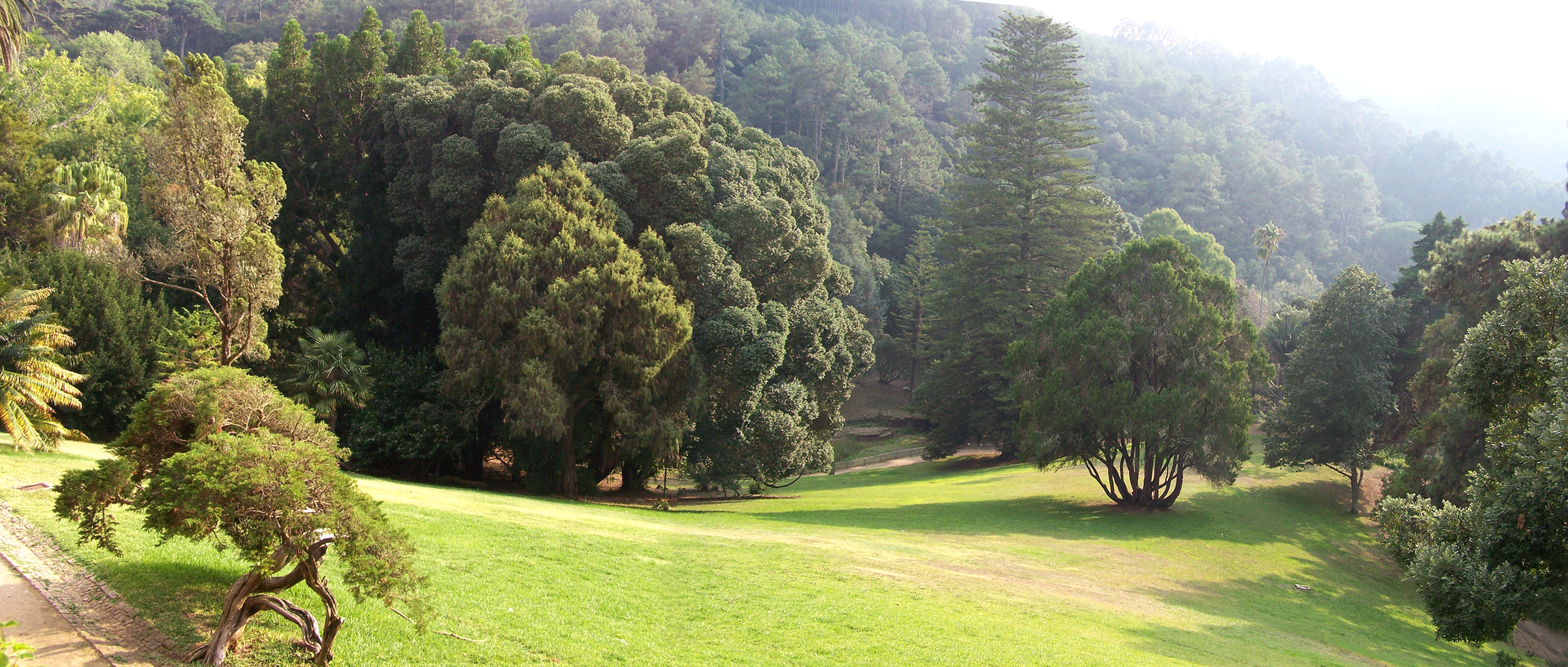 Palácio de Monserrate. Vista do palácio para o jardim e relvado. Sintra, Portugal. Montagem de duas fotografias.